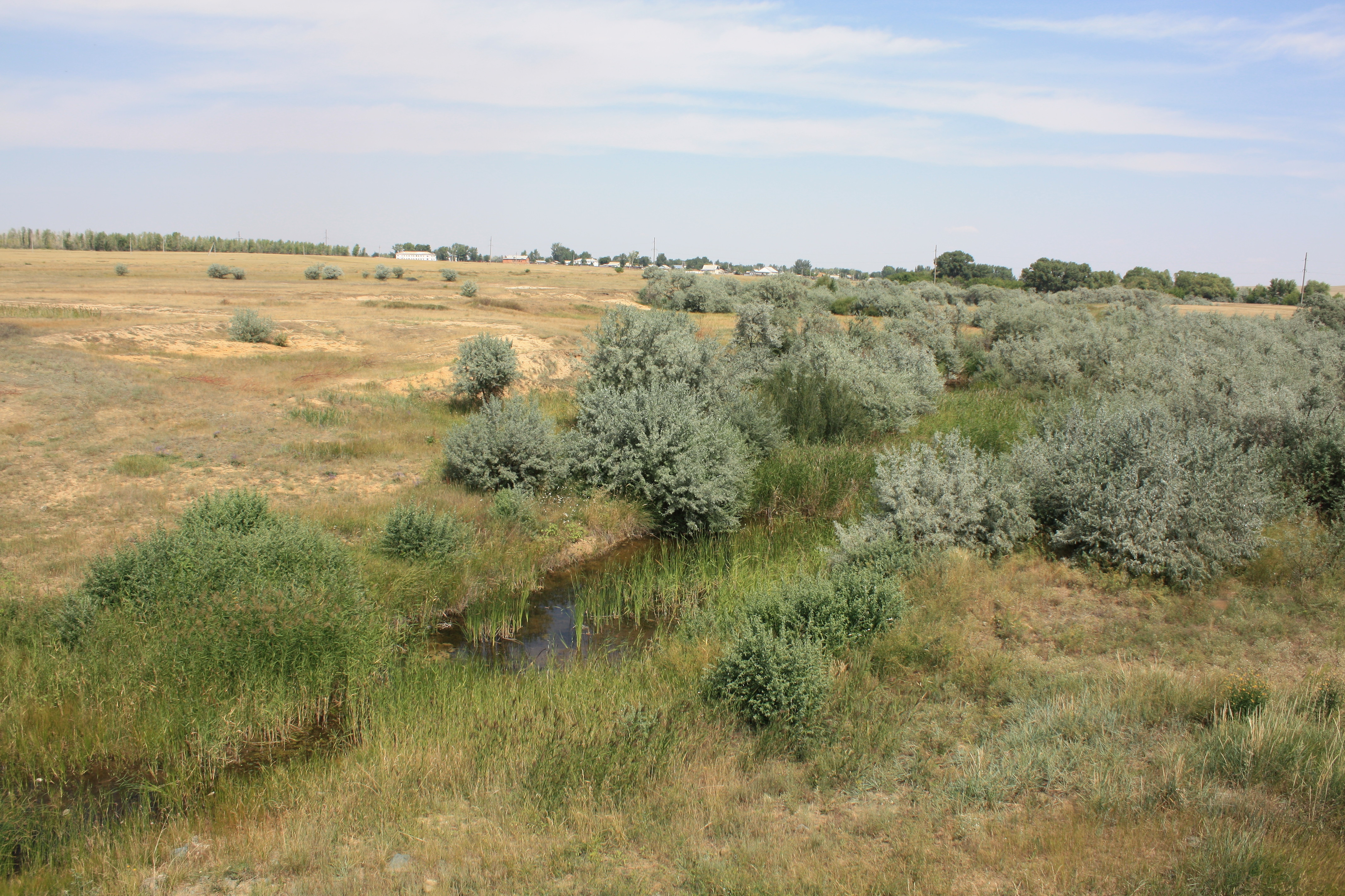 Речка Домбаровка и одноименный посёлок